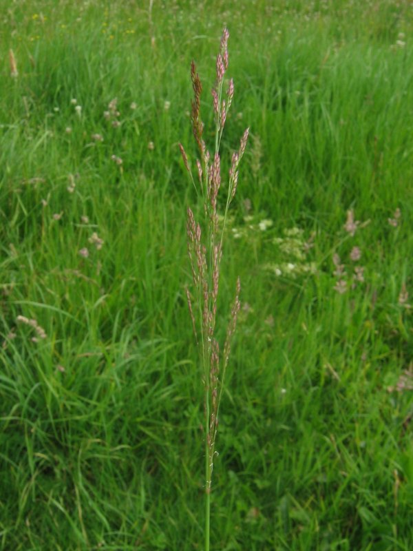 Weißes Straußgras (Agrostis stolonifera), Gragetopshof